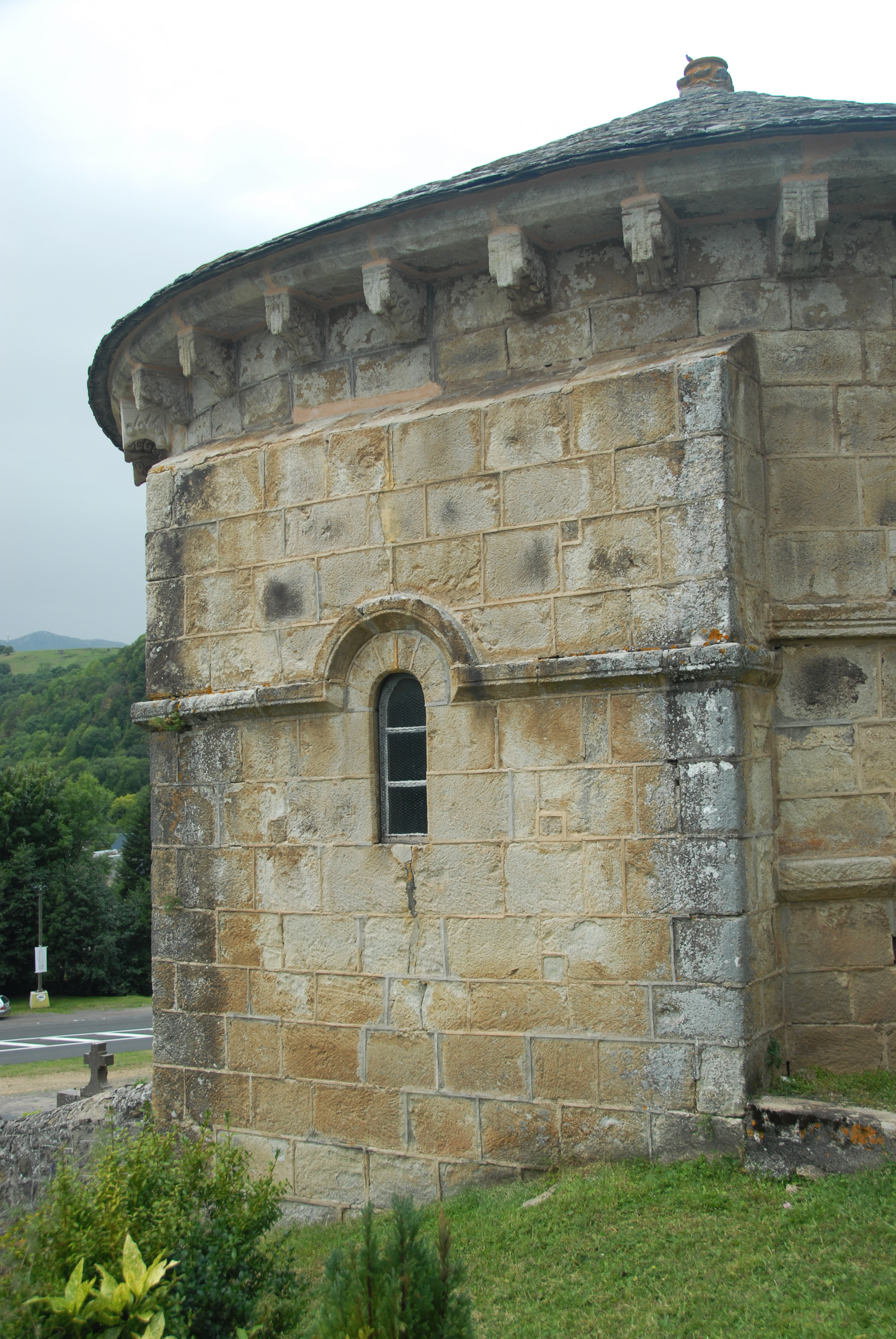 Chambon-sur-Lac, Friedhofskapelle, Wandvorlage im Osten